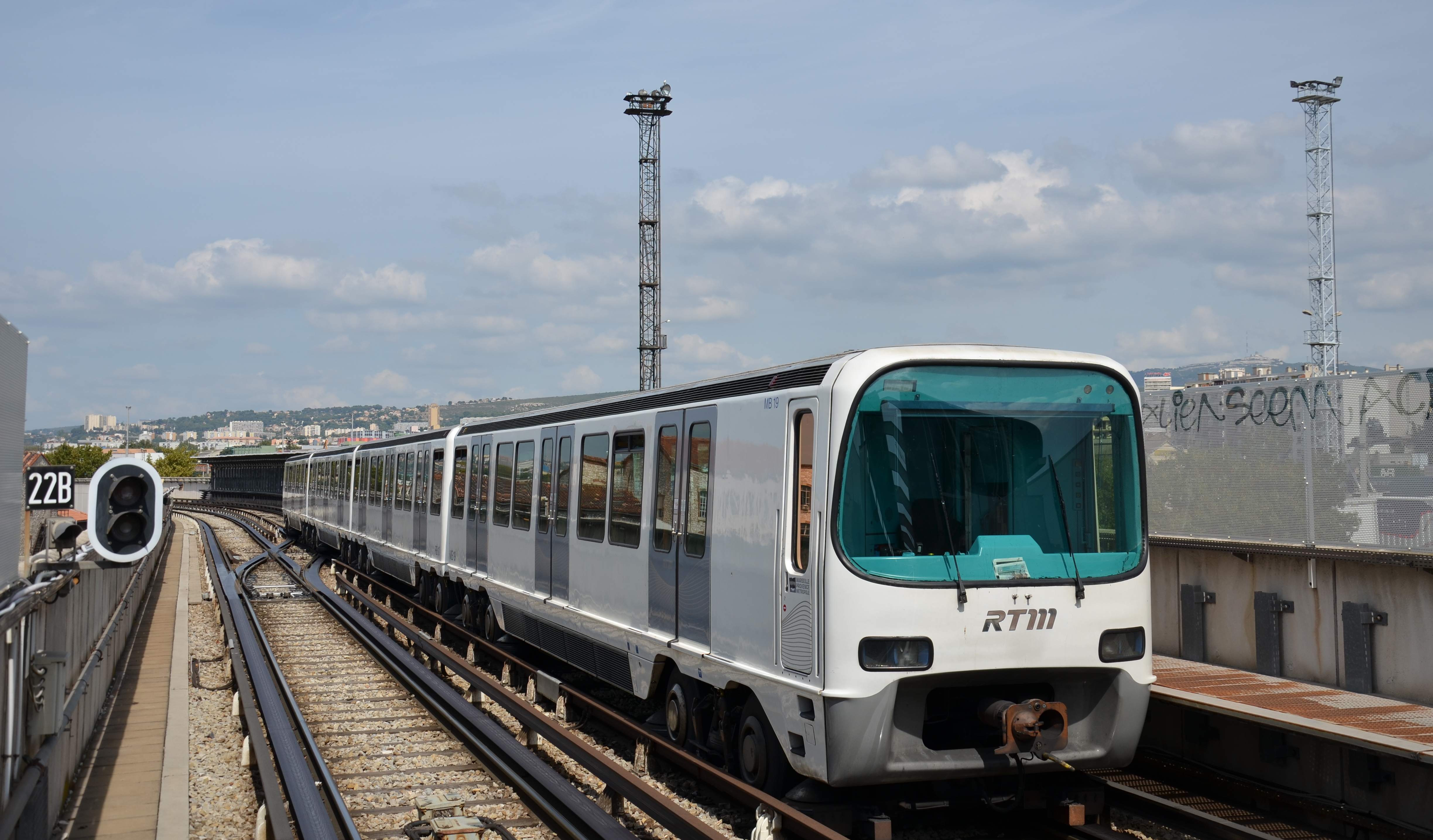 MPM76 n°33 sur la ligne 2 du métro de Marseille, à son terminus Bougainville.